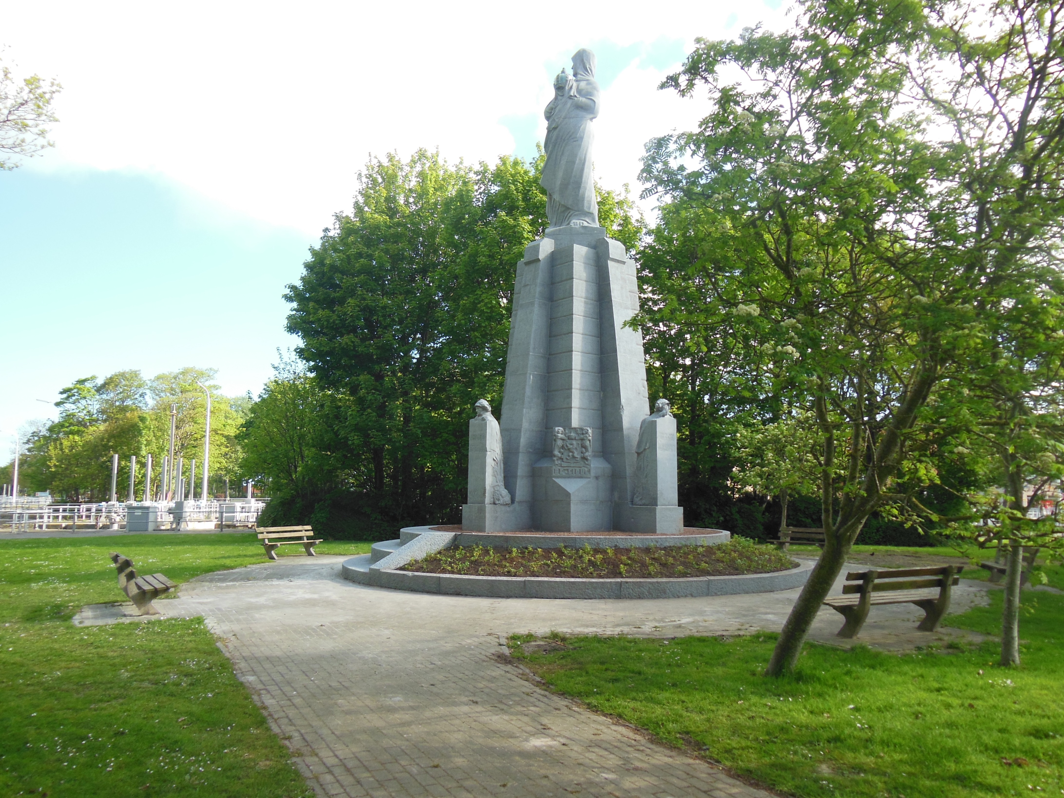 Het IJzergedenkteken na restauratie